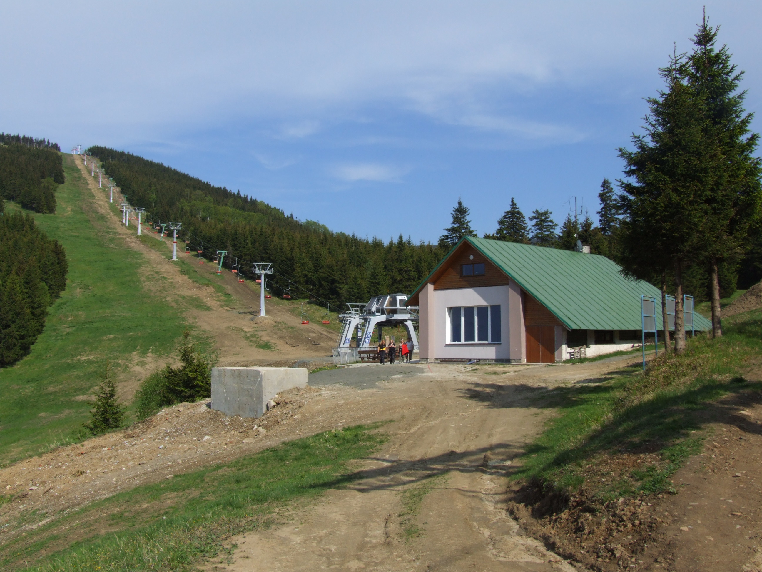 Lanová dráha Ramzová - Šerák (úsek Čerňava – Šerák) v létě